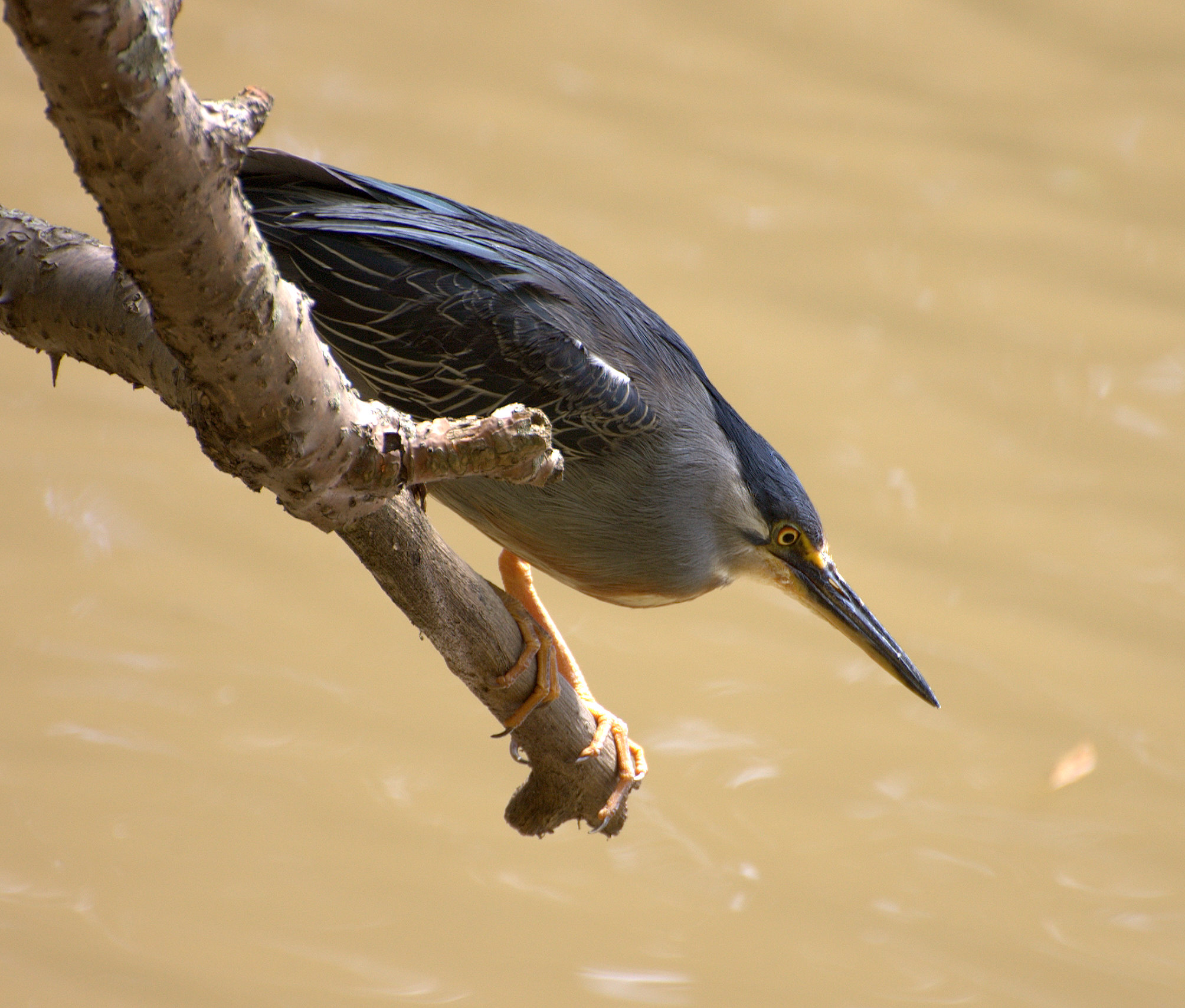 Horto Florestal em São Paulo